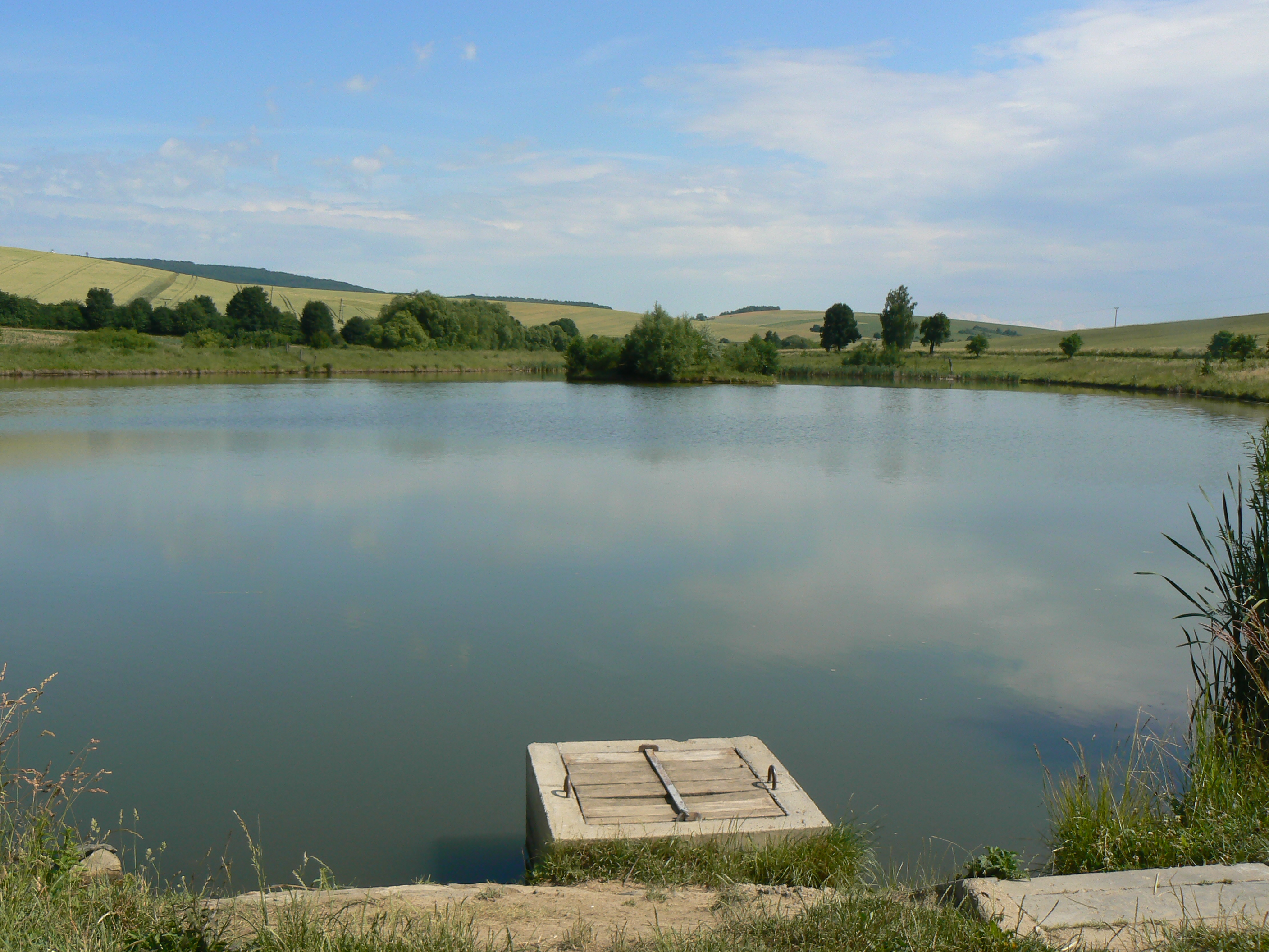 Vodní nádrž HLavatka u Brankovic.